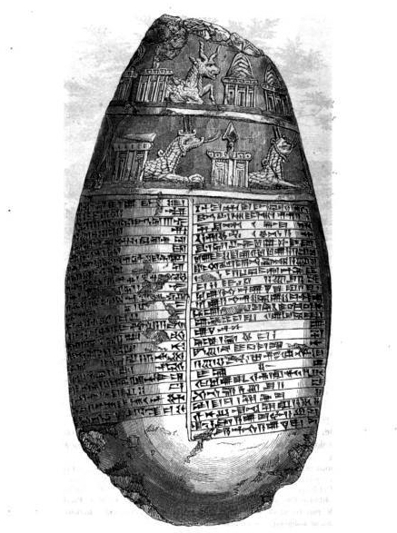 The Michaux Boulder - Le caillau Michaux